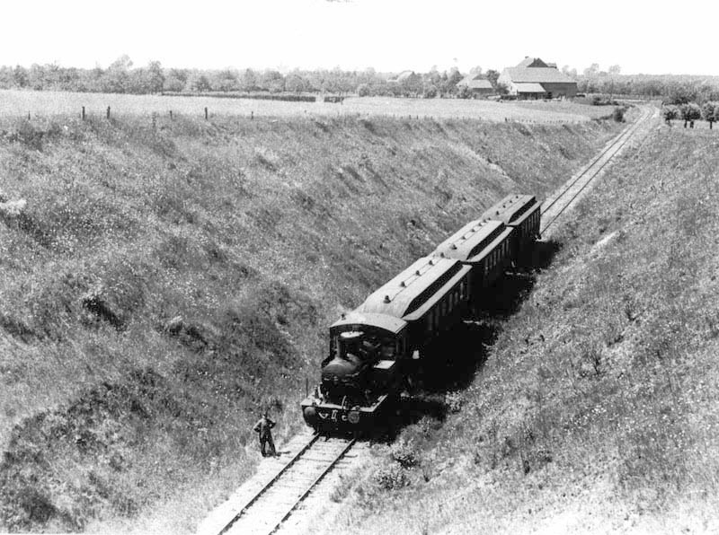 Stoomtramlijn Maastricht-Vaals nabij de forellenkwekerij in Gulpen. Fotocollectie RHCL Maastricht, GAM 33502.